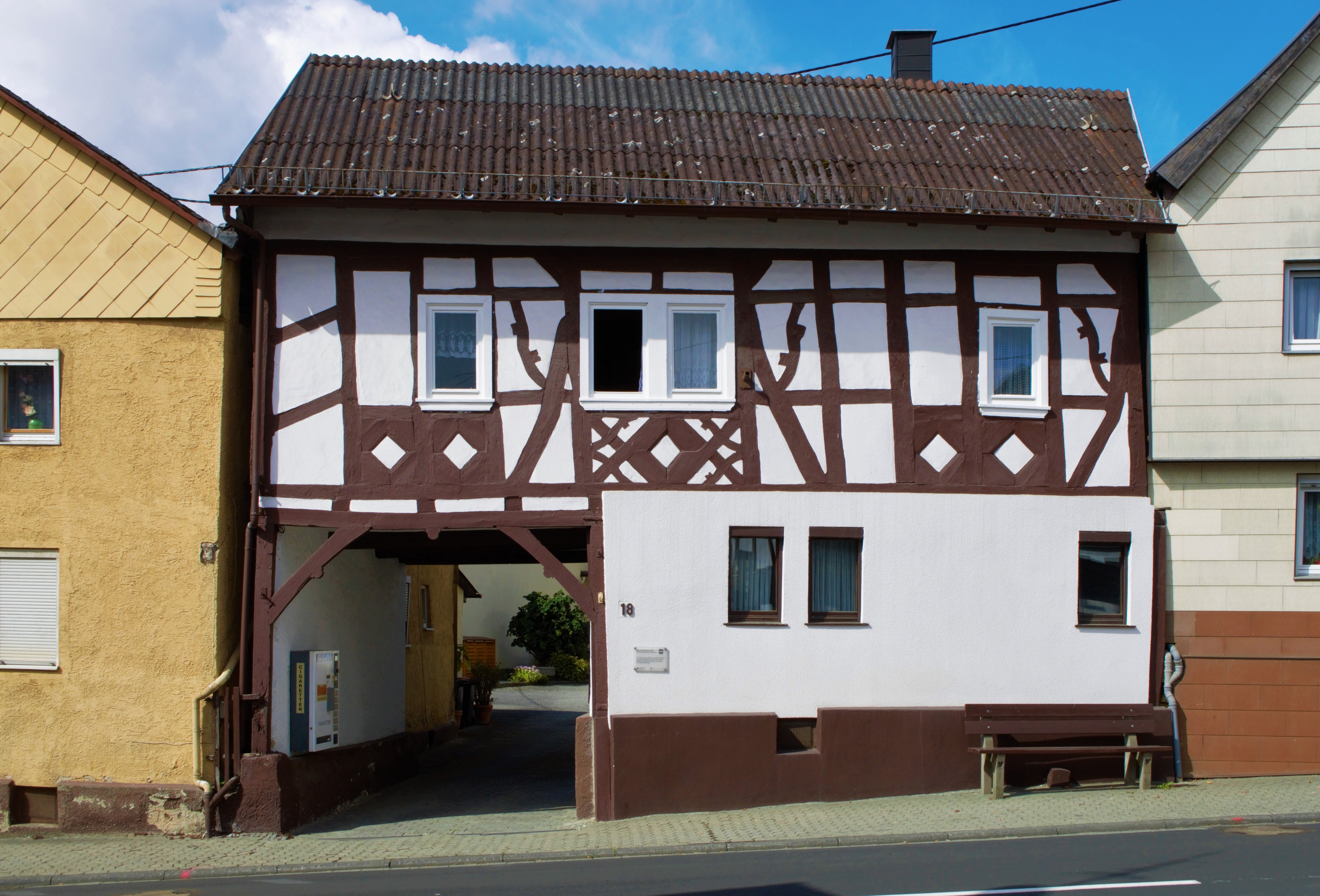 Herrschaftlicher Hof - Usinger Straße 18 - entstürzt